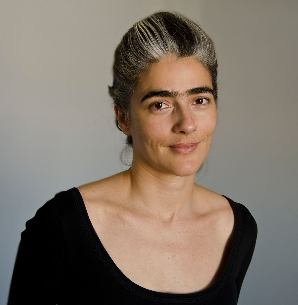 Cecilia Vignolo artista plástica uruguaya.